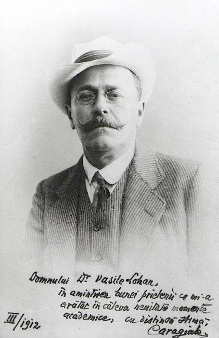 Ion Luca Caragiale